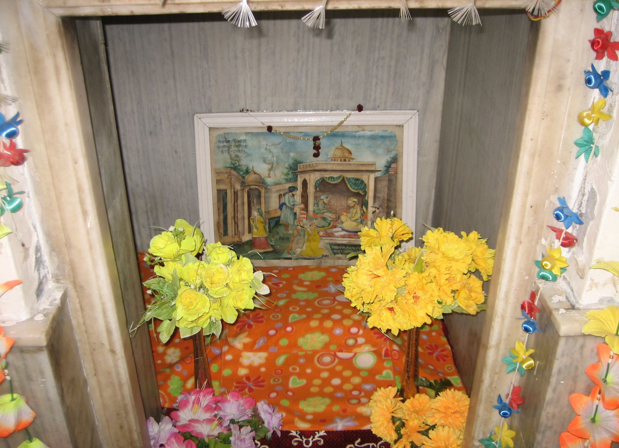 Gurudwara Shree Kodri Sahib